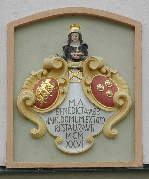 Gedenktafel mit Wappen am Haus Walburgiberg 1 Eichstätt. Text: M.A. Benedicta Abb. hanc domum ex toto restauravit MCMXXVI